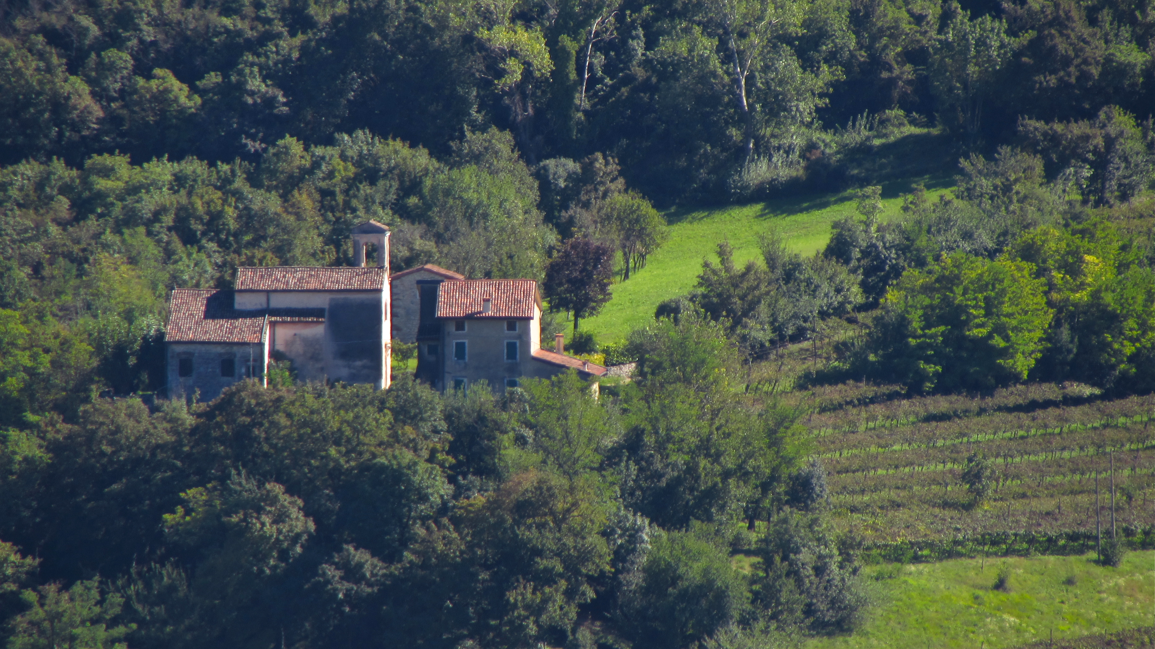 Vista da S. Michele della Corte Benedettina medievale di Brendola, nei pressi della frazione di S. Vito